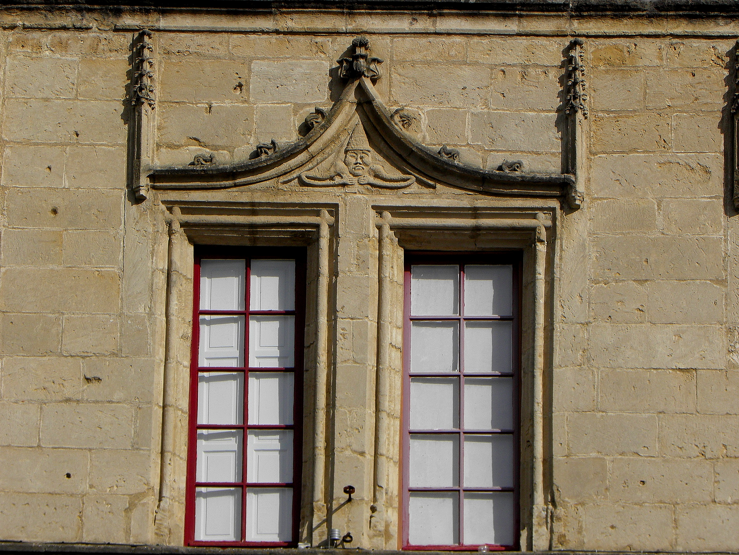 Maison de l'Astronome, commune de Bazas (33). Détail. Fenêtre.